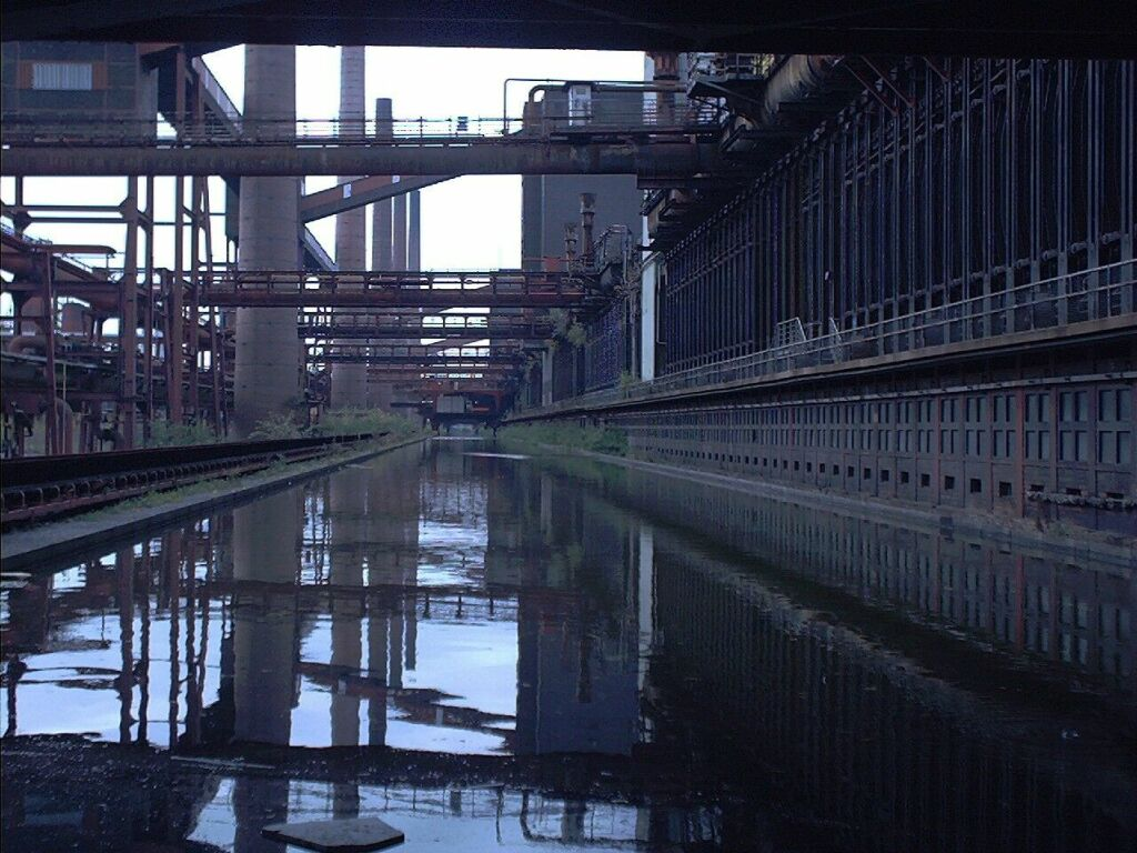 Kokerei Zollverein, Beschickungsseite (Die Wasserfläche ist nicht funktional, sondern entstand nach der Stilllegung der Kokerei im Zuge der Umnutzung als Industriemuseum.)